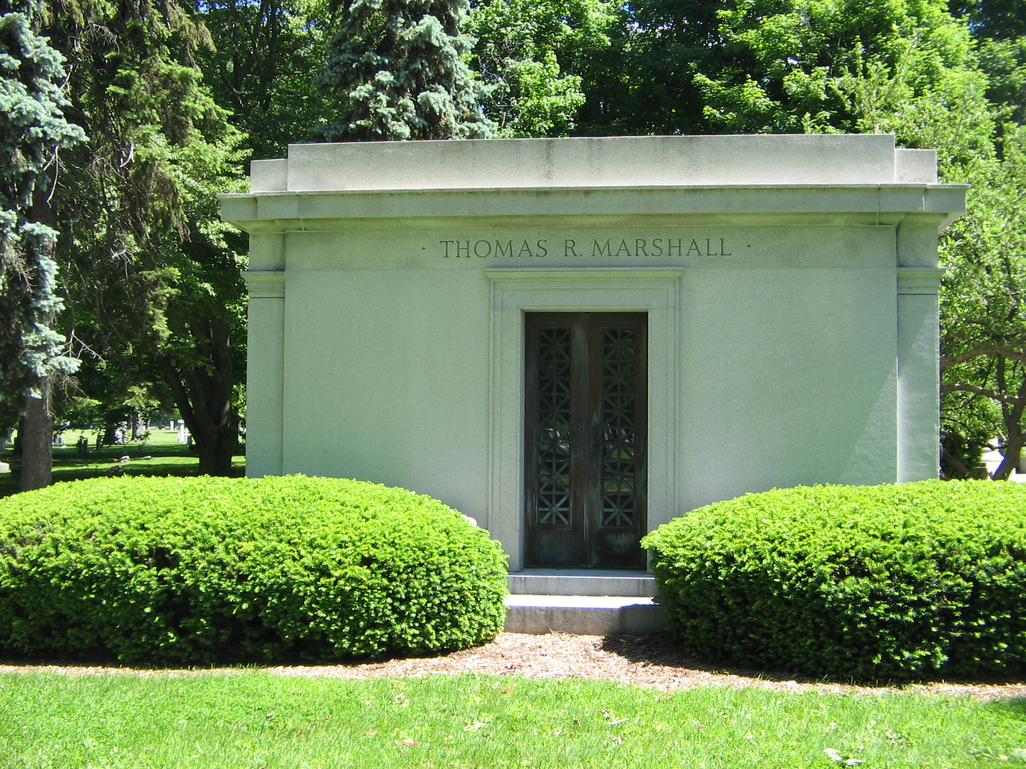 中文（中国大陆）: 美国第28任副总统托马斯·R·马歇尔的墓地，位于印第安纳波利斯的克朗山公墓，他的夫人和养子也下葬于此。